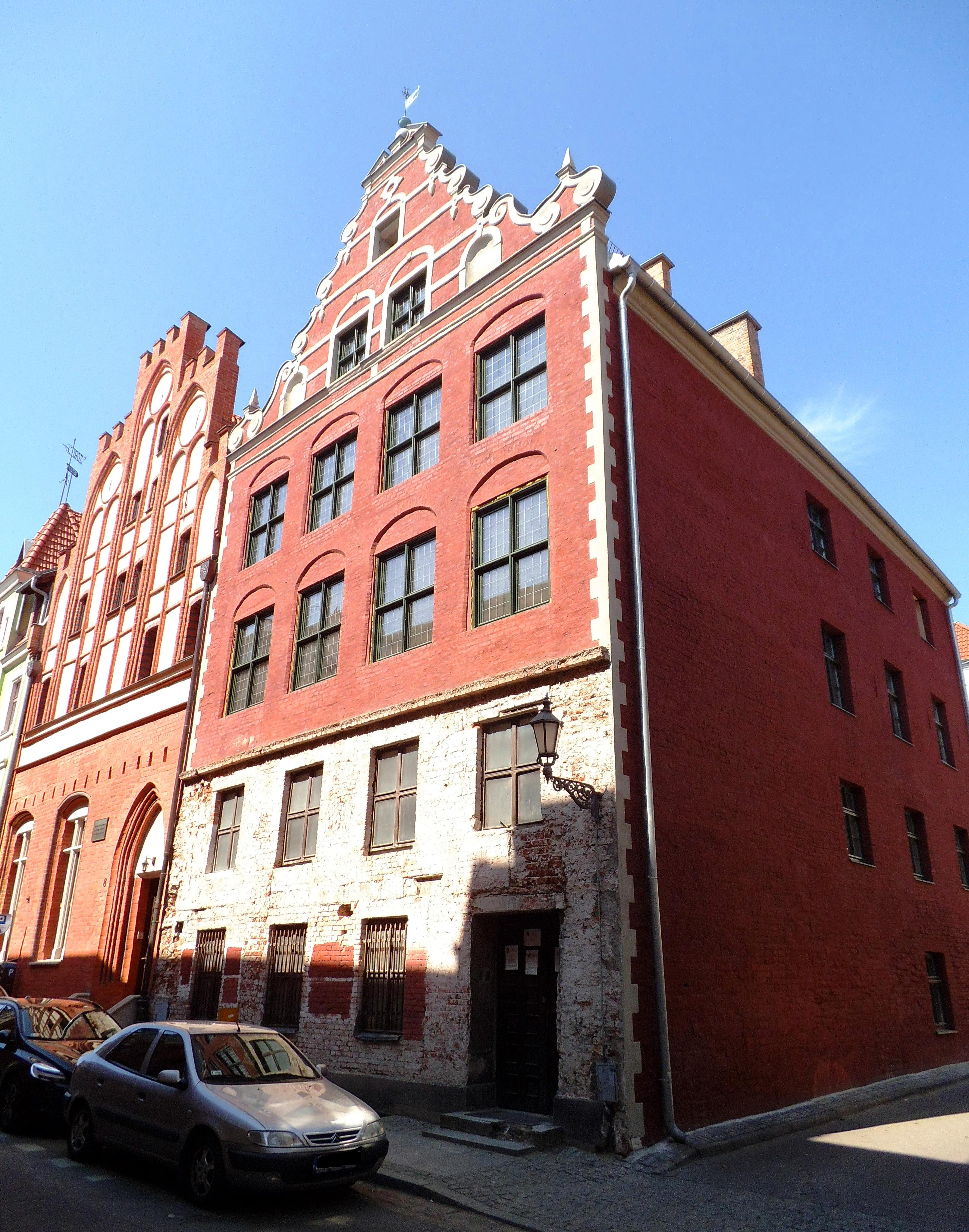 Centrum Astronomiczne im. M. Kopernika PAN w Toruniu